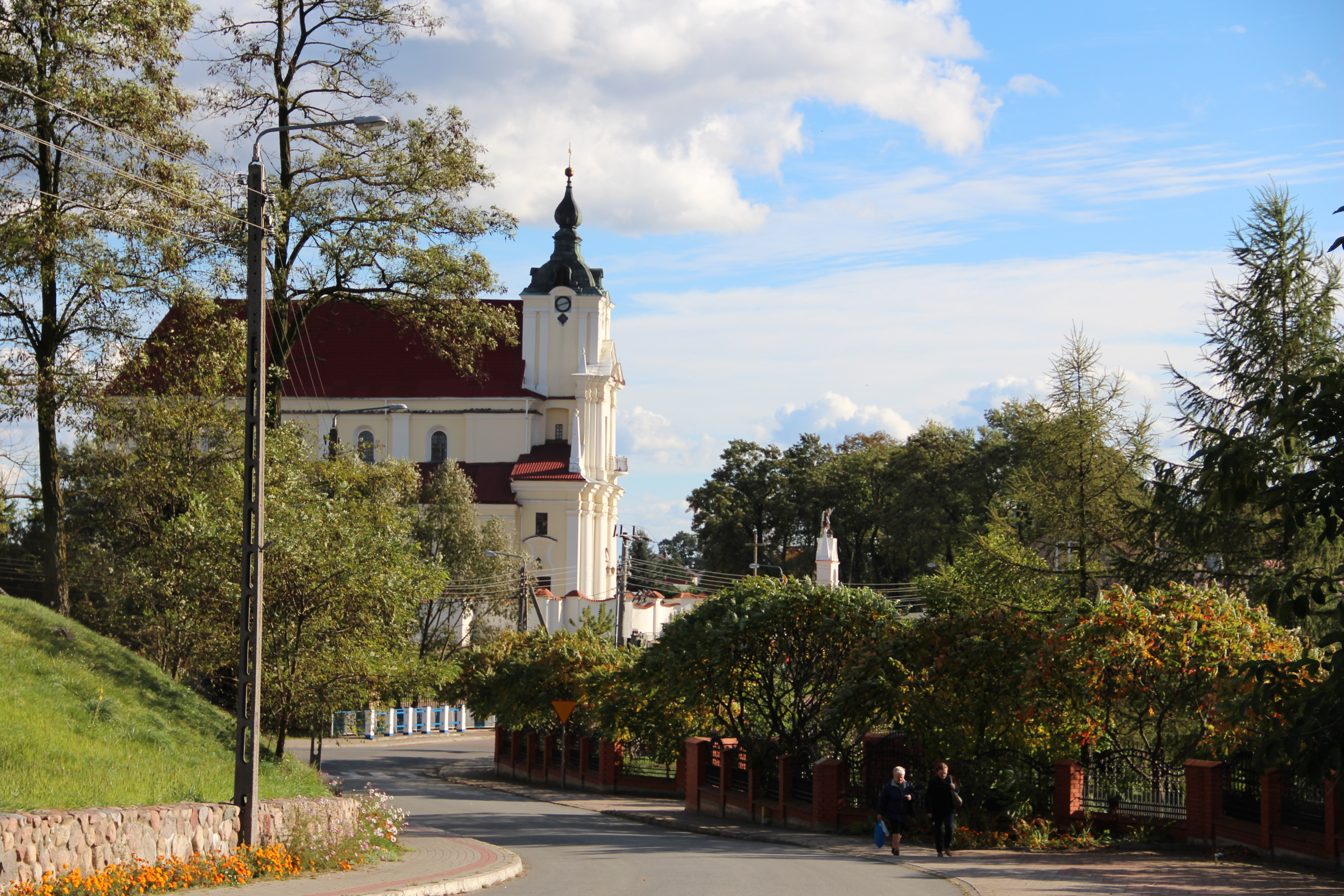 Kościół w Siemiatyczach.